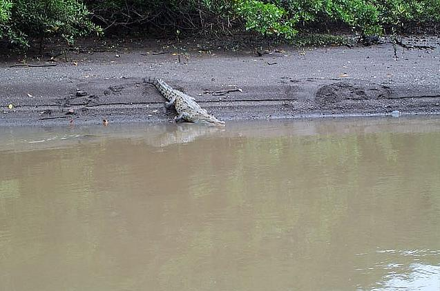 Cocodrilo fotografiado en el Río Matapalo, Tamarindo, Guanacaste, Costa Rica.